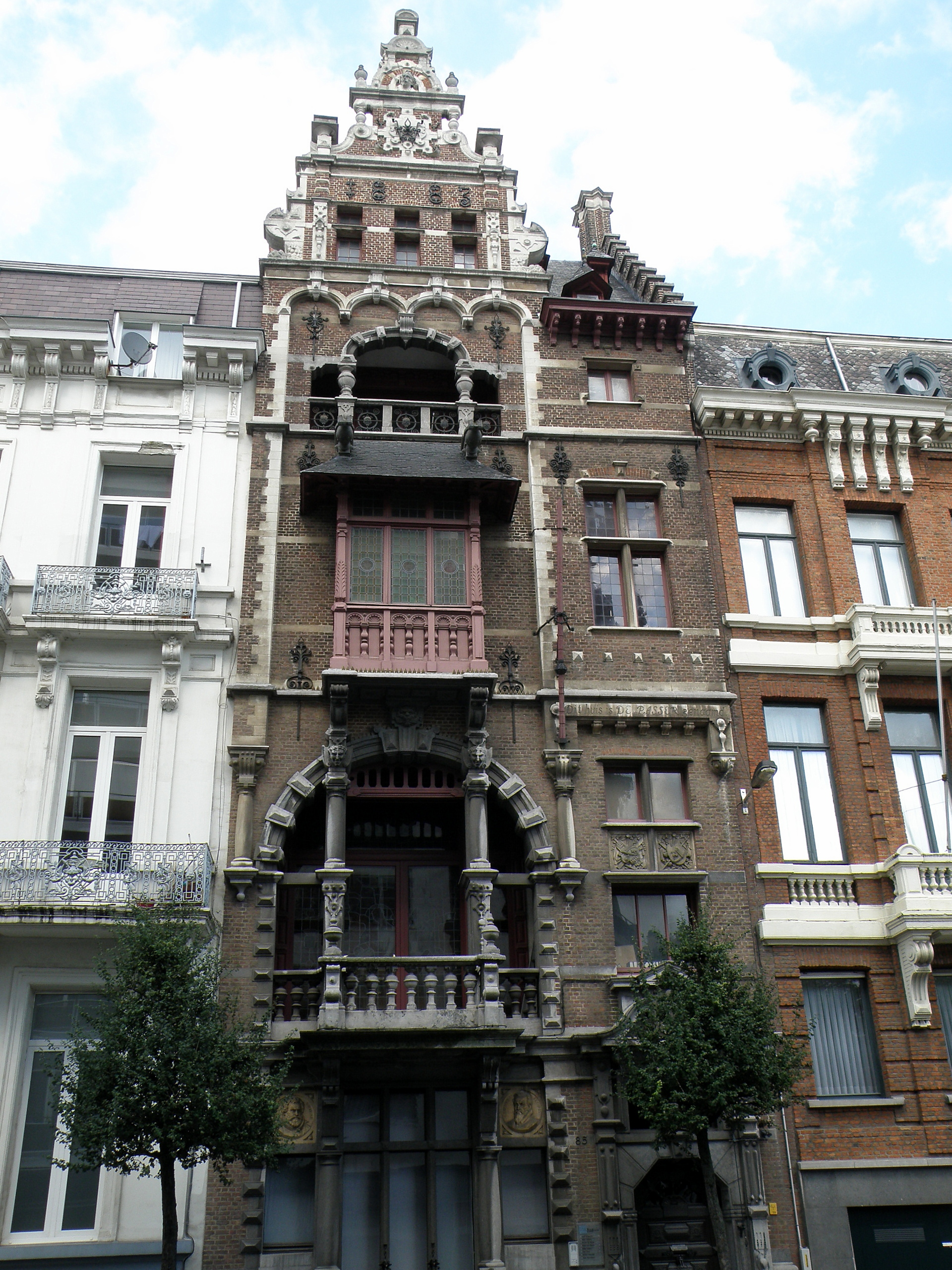 Antwerpen (België). Neo-Vlaamse-Renaissancehuis De Passer, Tolstraat nr.85. Archit. Jean-Jacques Winder, anno 1883.